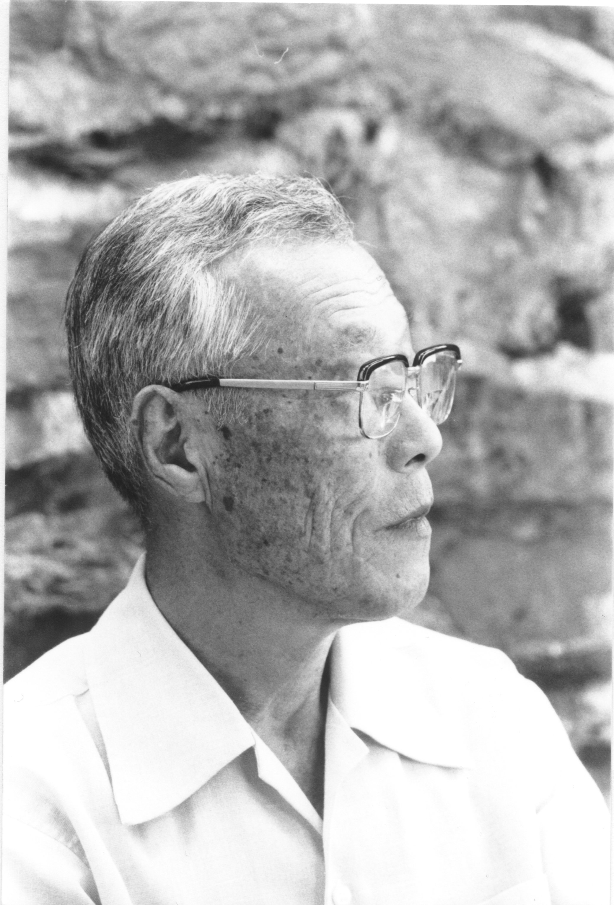 Inagaki Genshiro Sensei